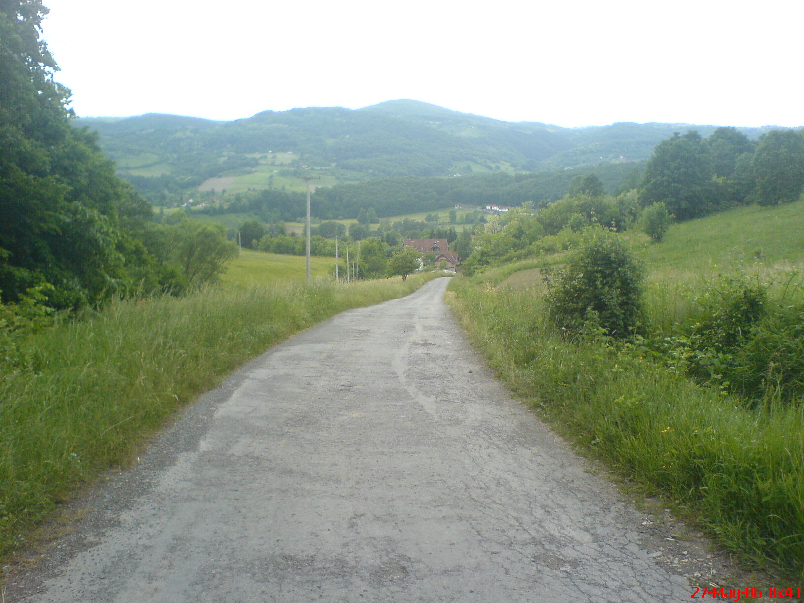 Пут у Шаранима који води од Савинца ка Семедражи и даље ка Ибарској магистрали. На слици се види деоница уз Јелића ливаду, која је пробијена при асфалстирању пута 1980их.